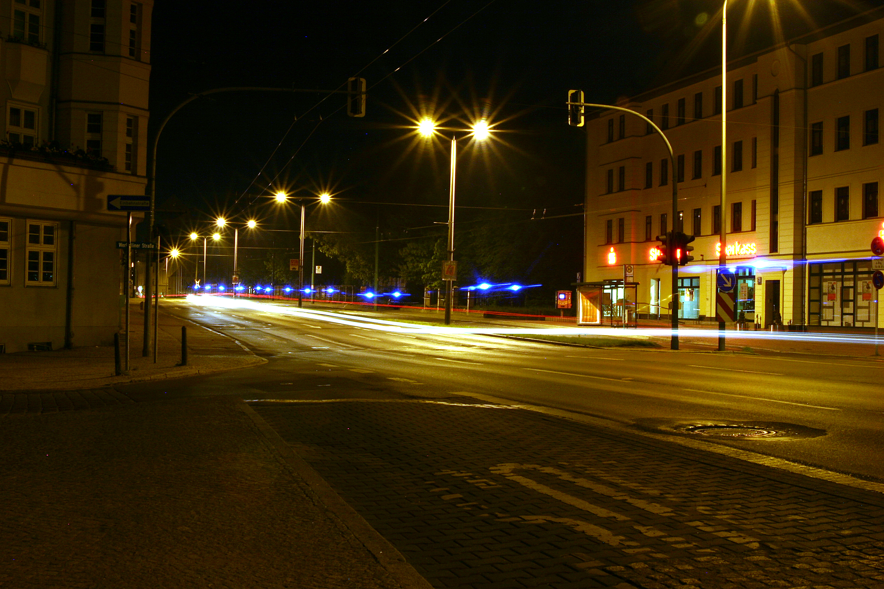 Langzeitbelichtung 30 Sekunden, nachträgliche kanalgetrennte Tonwertkorrektur und leichte Schärfung